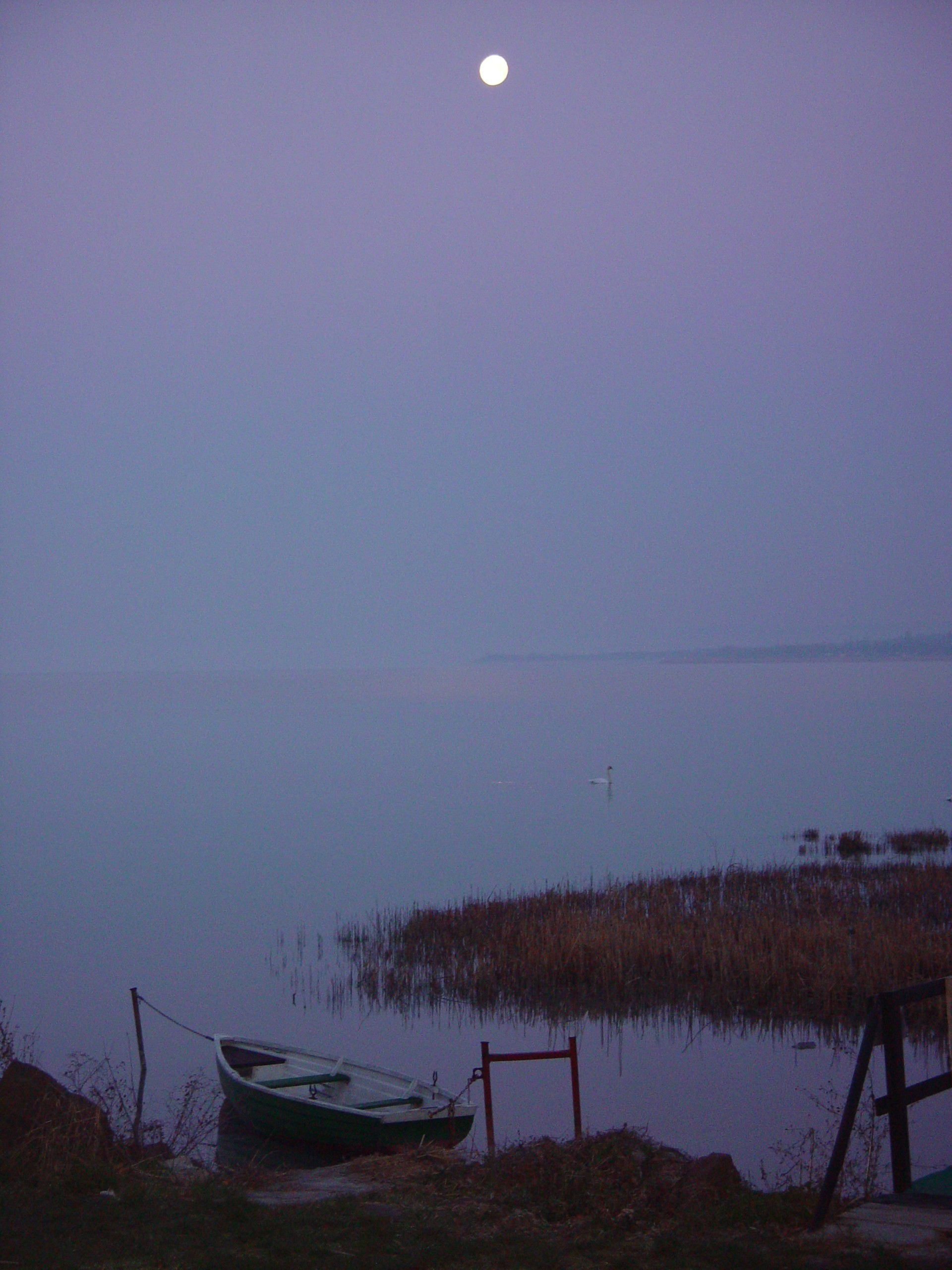 Telihold Aszófő felett